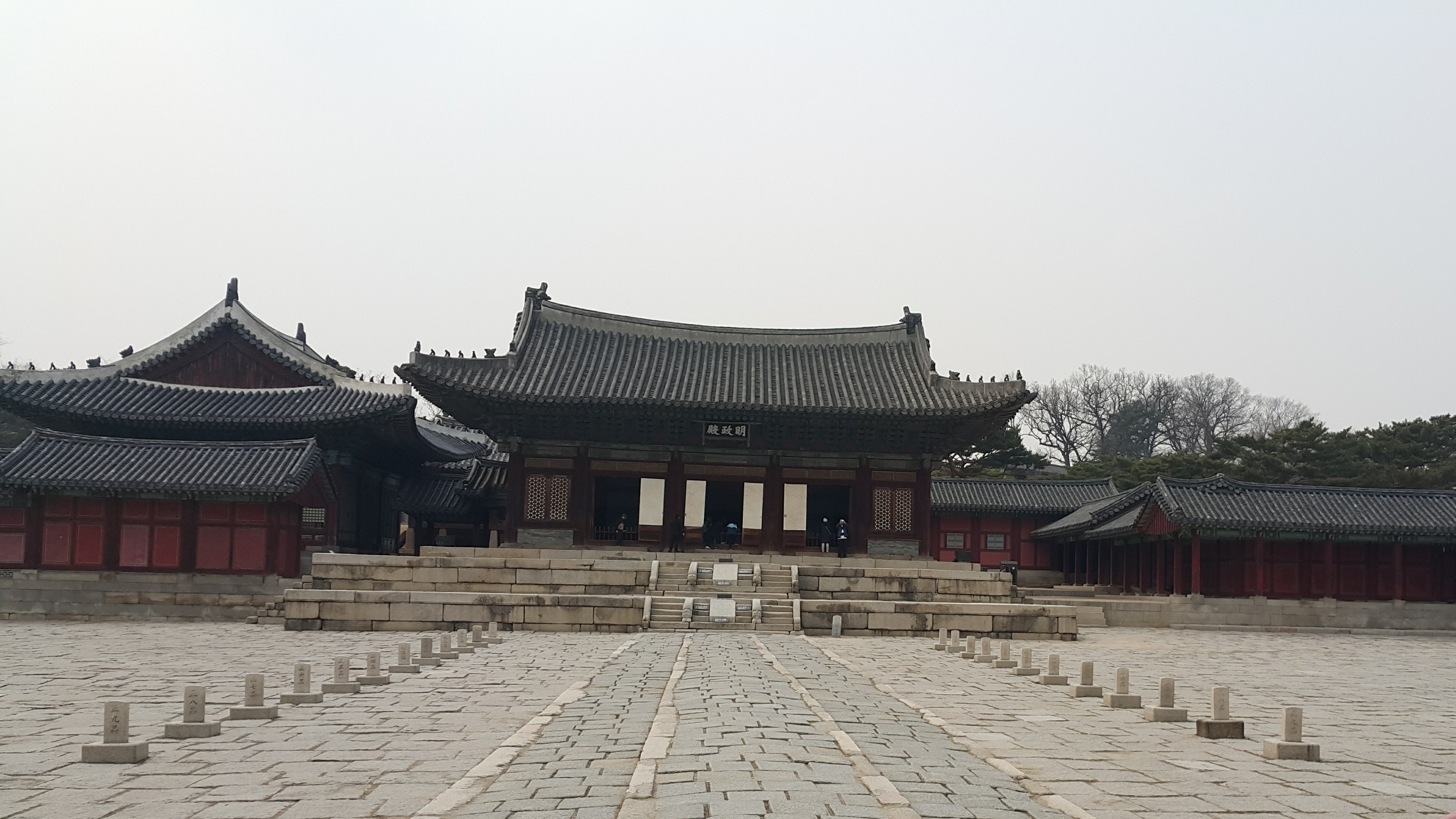 창경궁 명정전은 광해군 8년(1616)에 임진왜란으로 전소된 건각 중 명정전(정전). 환경전(침전). 인양전(침전)과 부속건물 및 회랑을 중건하였다. 그많은 건물 중 이괄의 난 때 대부분 소실 되었으며, 남은 건물은 정문인 홍화문과 정전인 명정전만 남았고, 9년후인 1633년(인조11)에 복원한 모습대로 현재까지 남아있어 5대 궁궐의 정전 중 가장 오래된 건물이다.